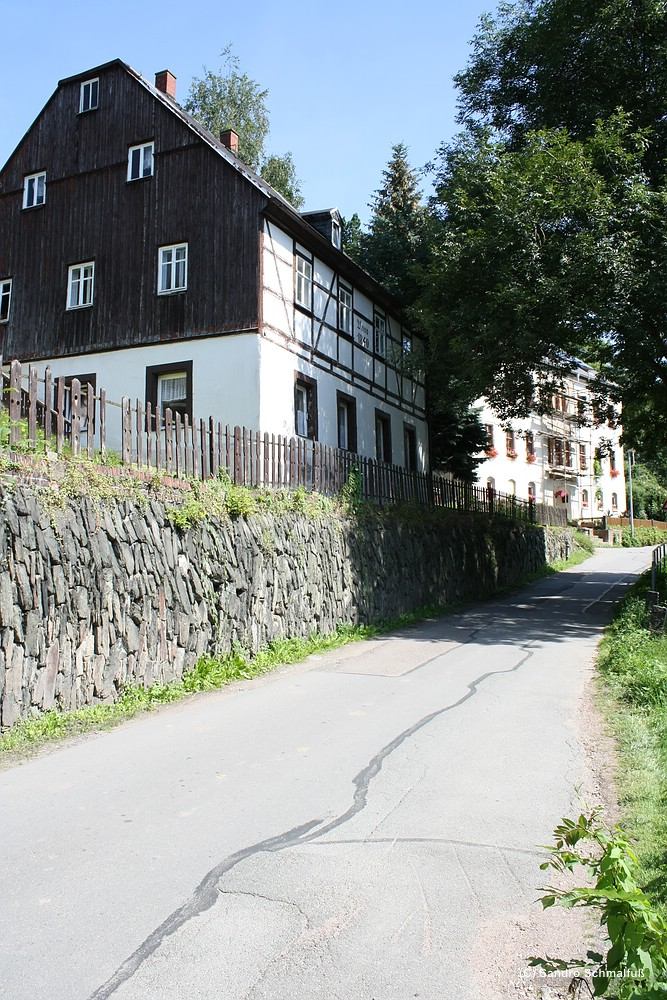 Fachwerkhaus und ehemalige Gemeindeverwaltung in Chemnitz-Harthau